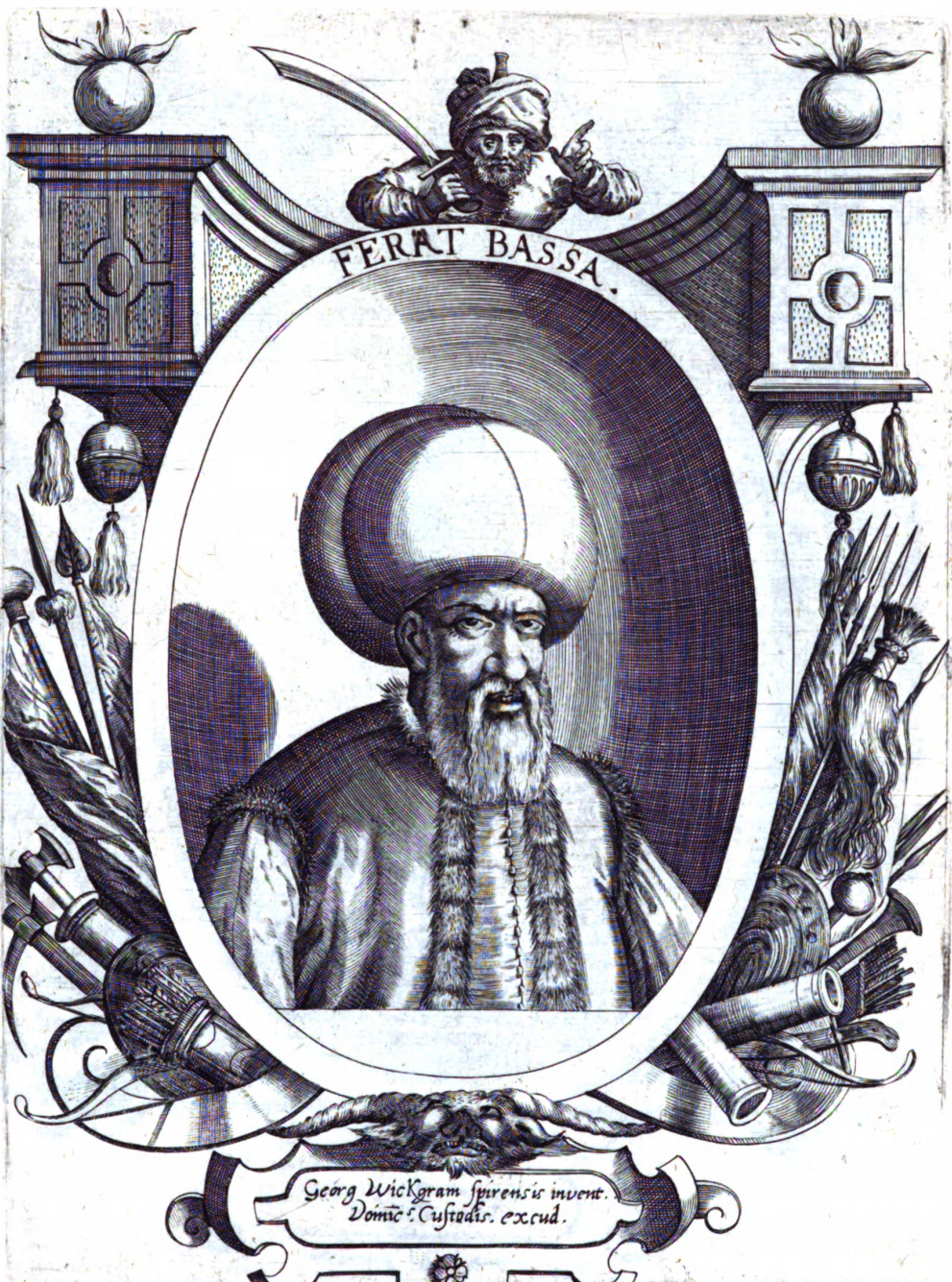 Ferhates Bassa.